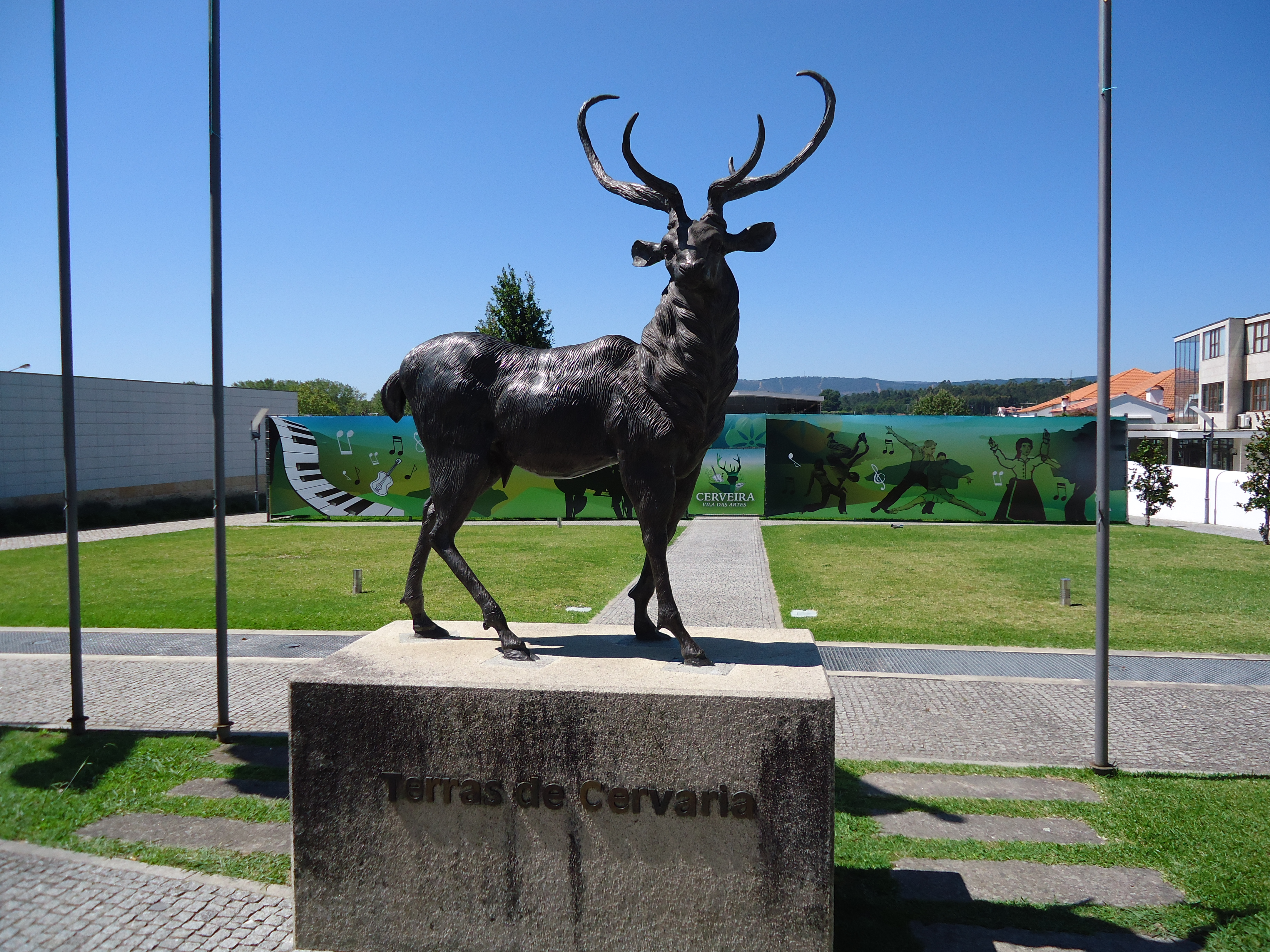 "O Rei Veado", concelho de Vila Nova de Cerveira, distrito de Viana do Castelo, Portugal. Autor: Zadok Ben-David, Bronze.